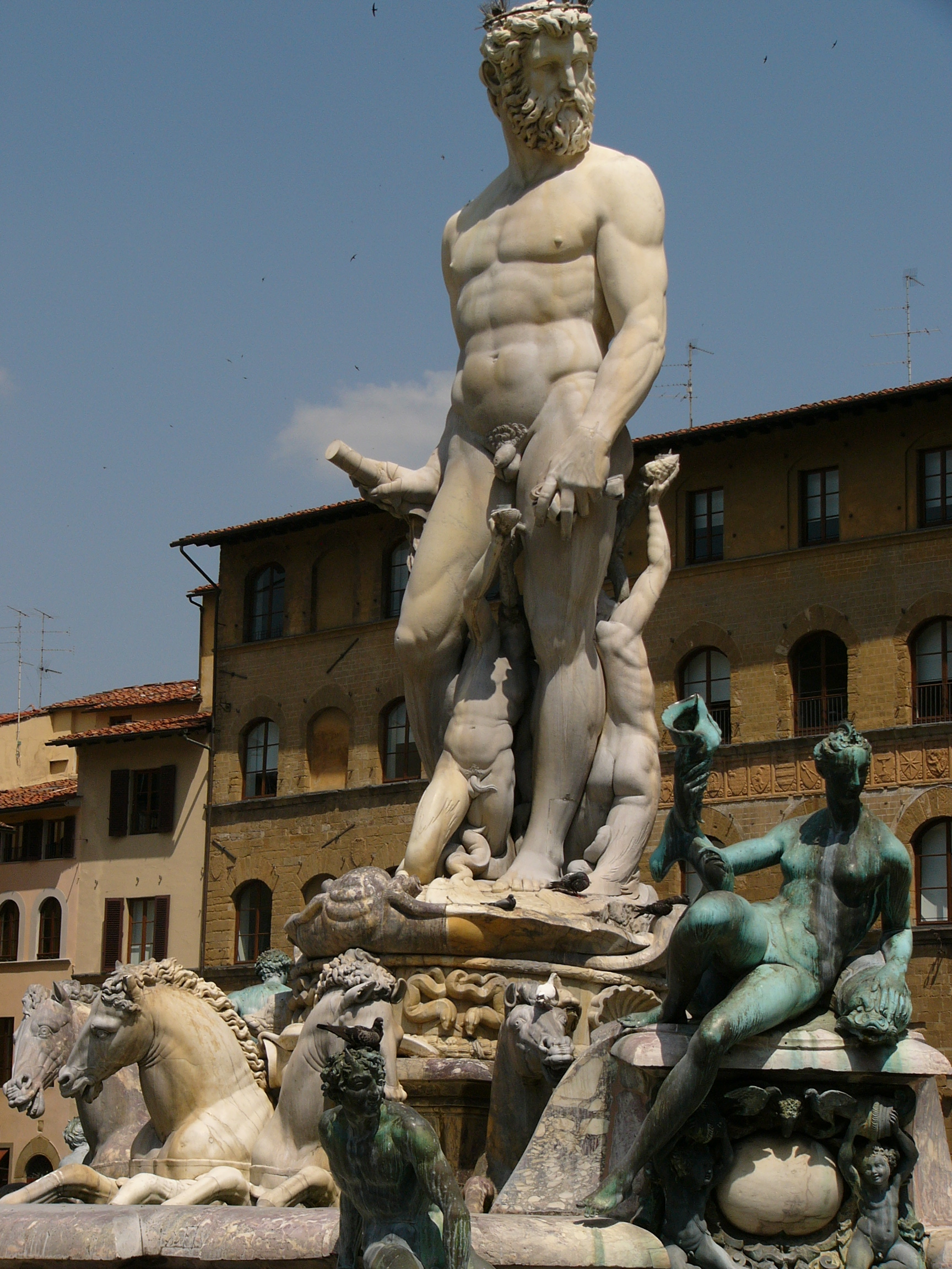 Neptunes fontein op de Piazza della Signoria in Florence